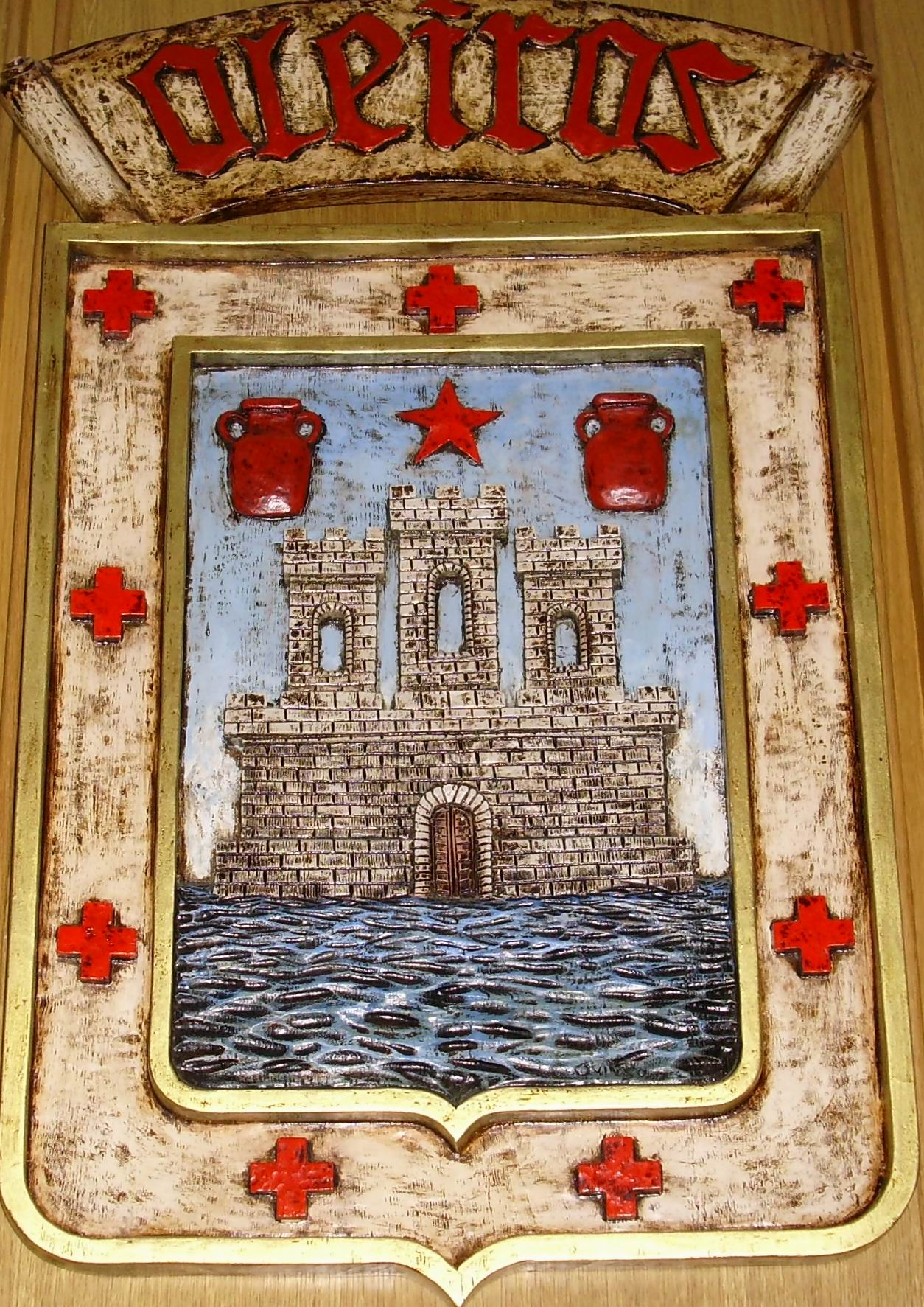 Escudo de Oleiros, en A Coruña (España)